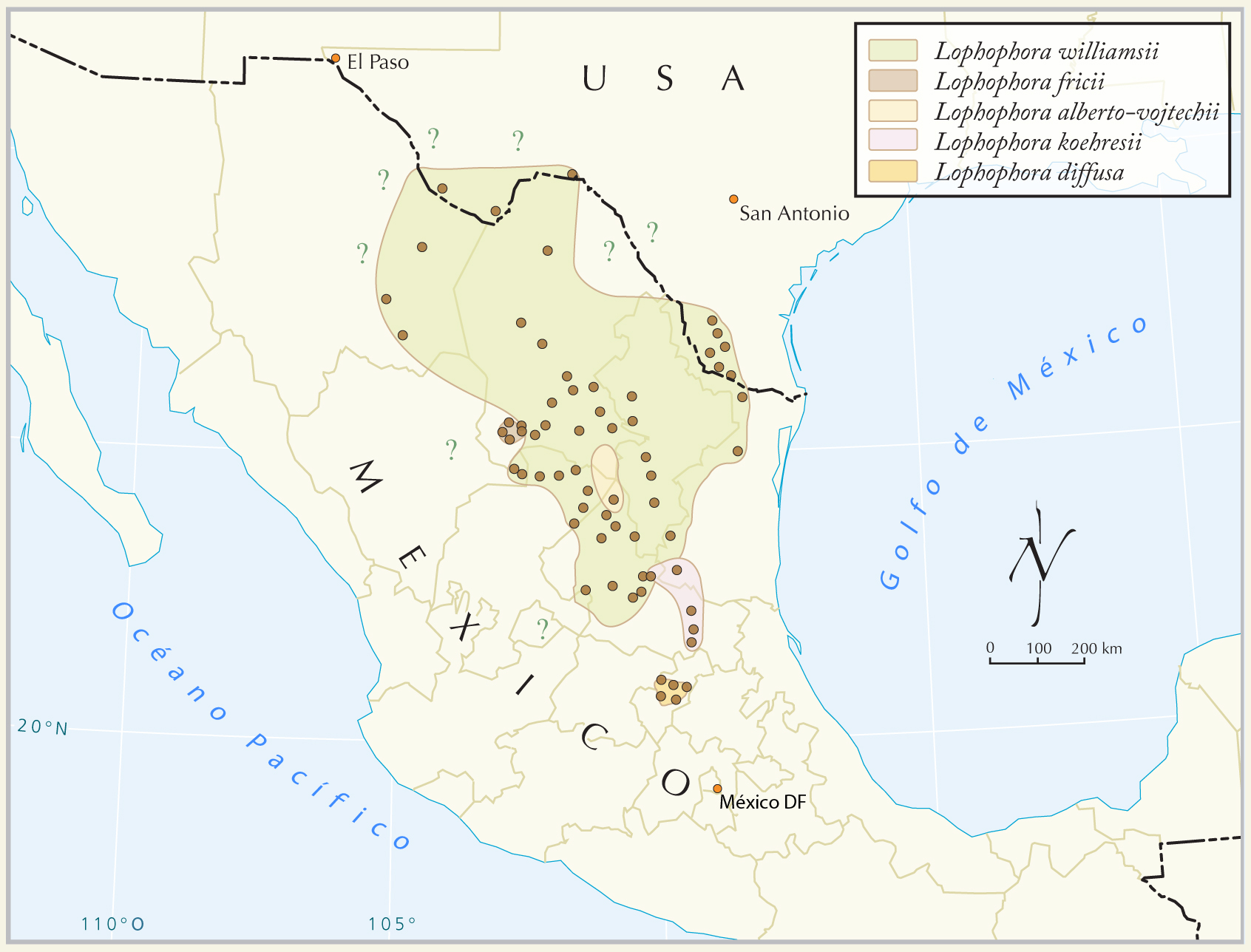 Distribución del Peyote (Lophophora williamsii). Modificado de "Terry, M. (2008). "Stalking the wild Lophophora: Part 3 San Luis Potosí (central), Querétaro, and Mexico City." Cactus and Succulent Journal 80(6): 310-317"